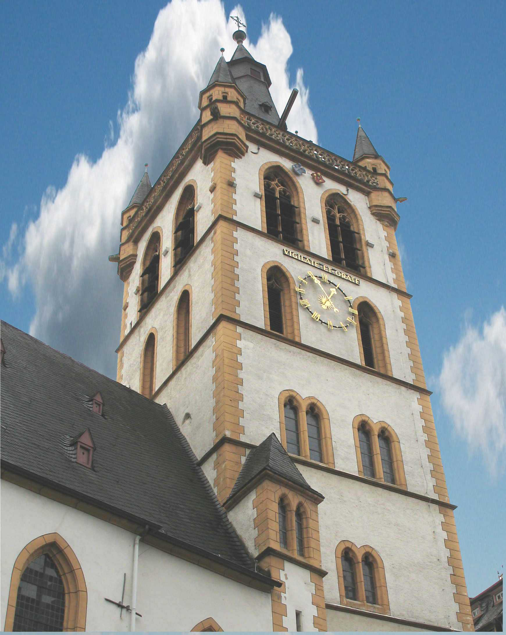 TR GANG.